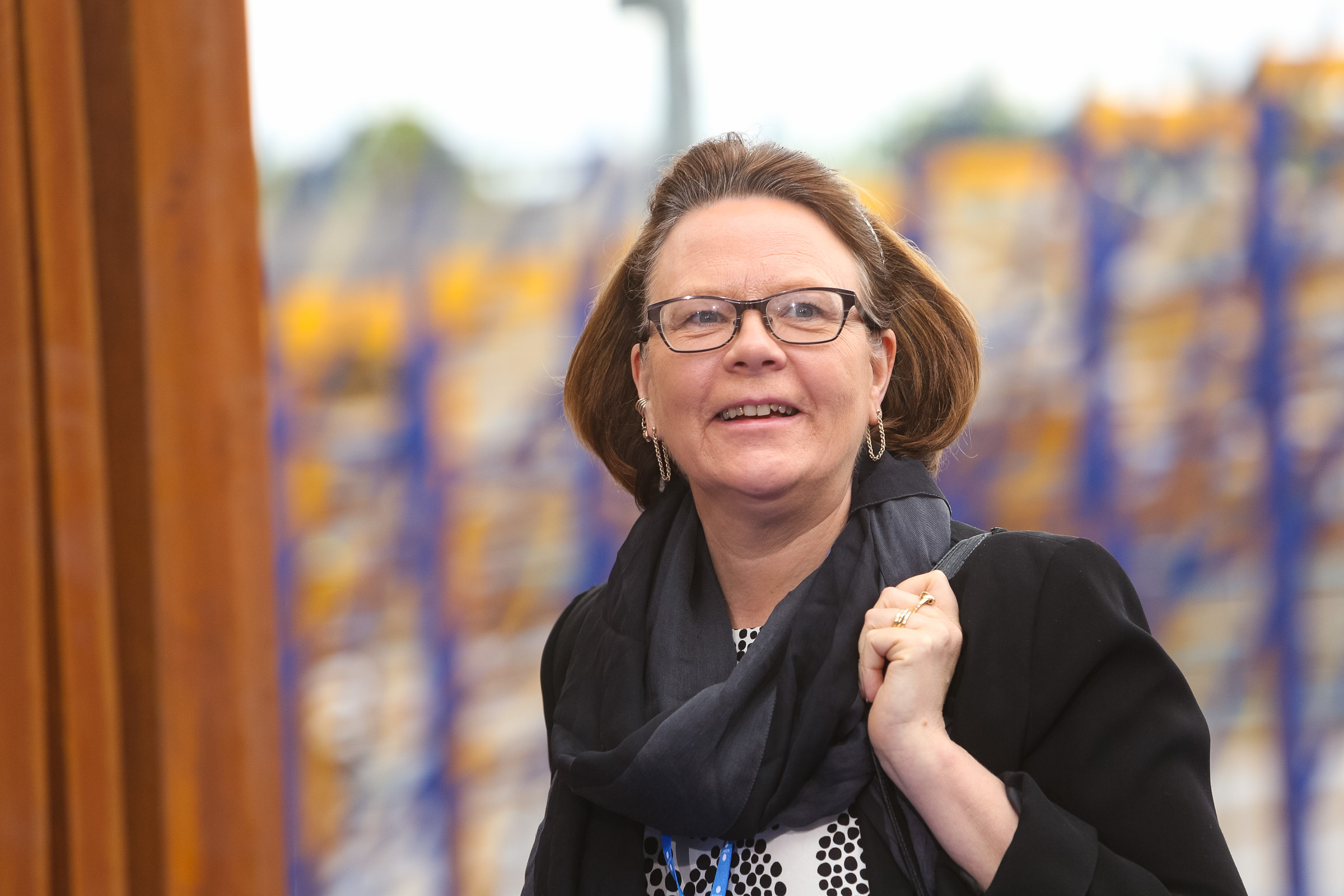 Kirsti Narinen, Soome suursaadik Eestis